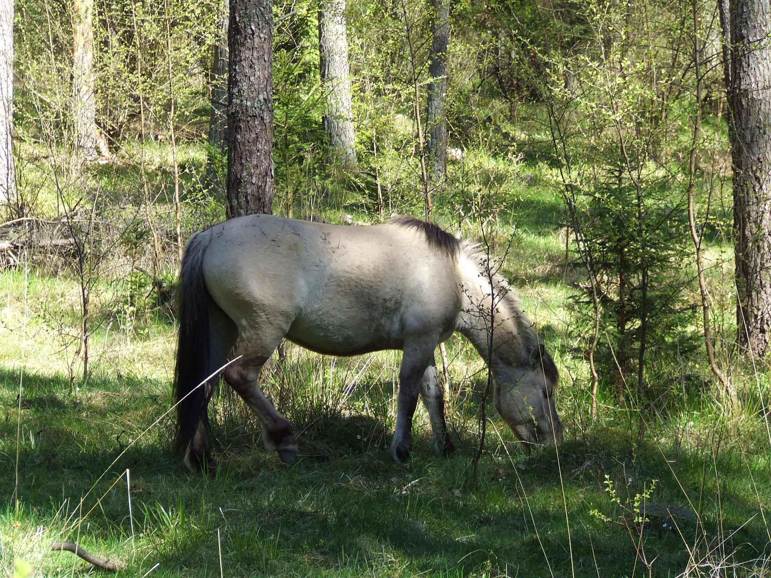 Popielno - konik polski (powiat piski)